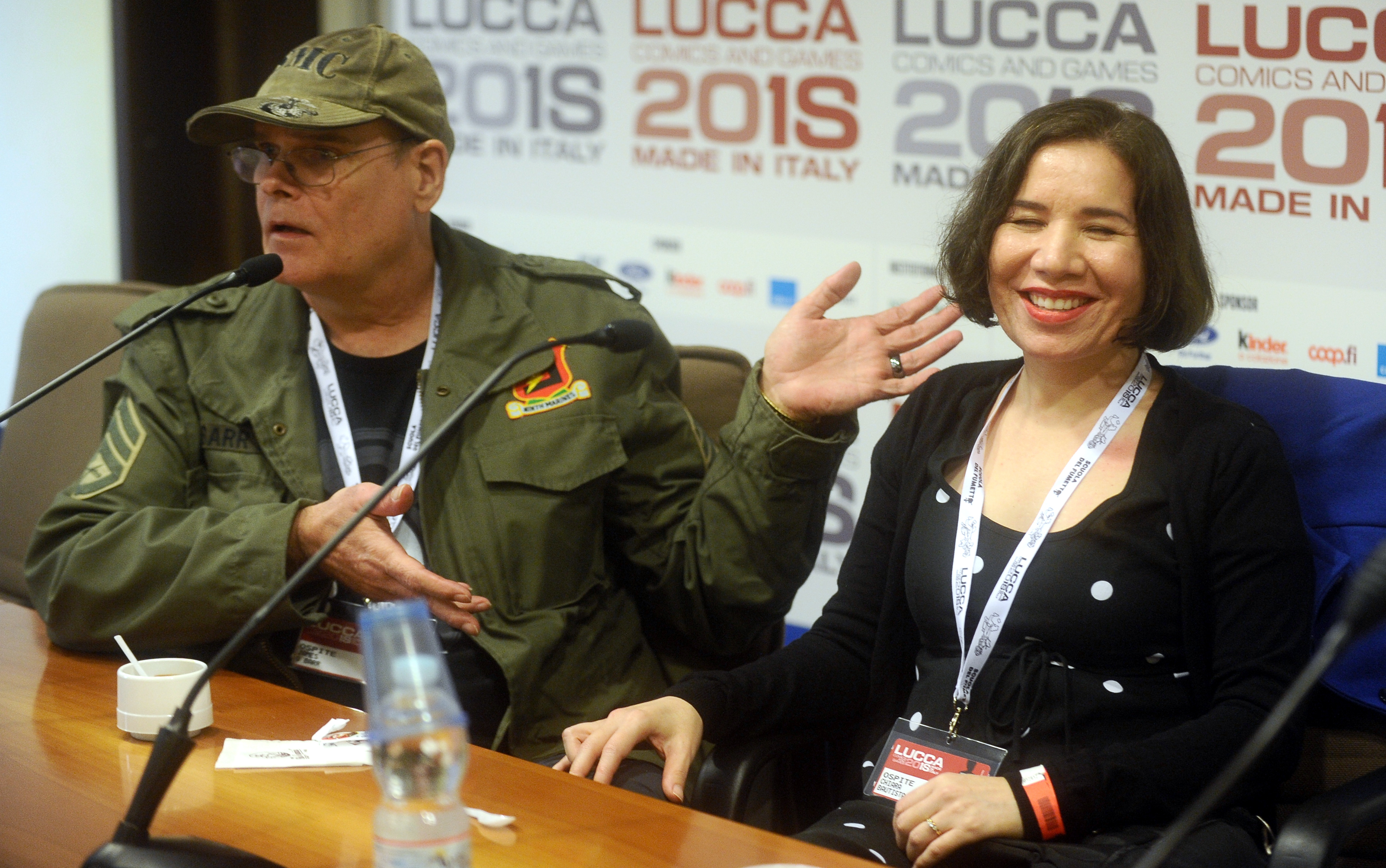 James O'Barr e Chiara Bautista a Lucca Comics & Games 2018. Conferenza stampa in Camera di Commercio.